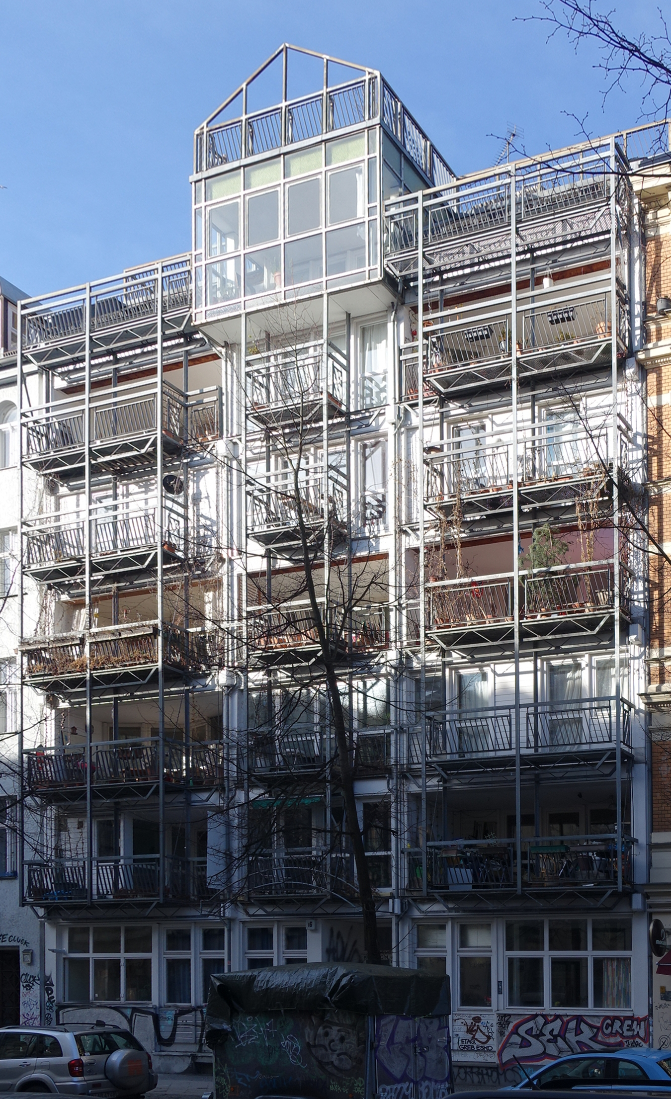 Mietshaus